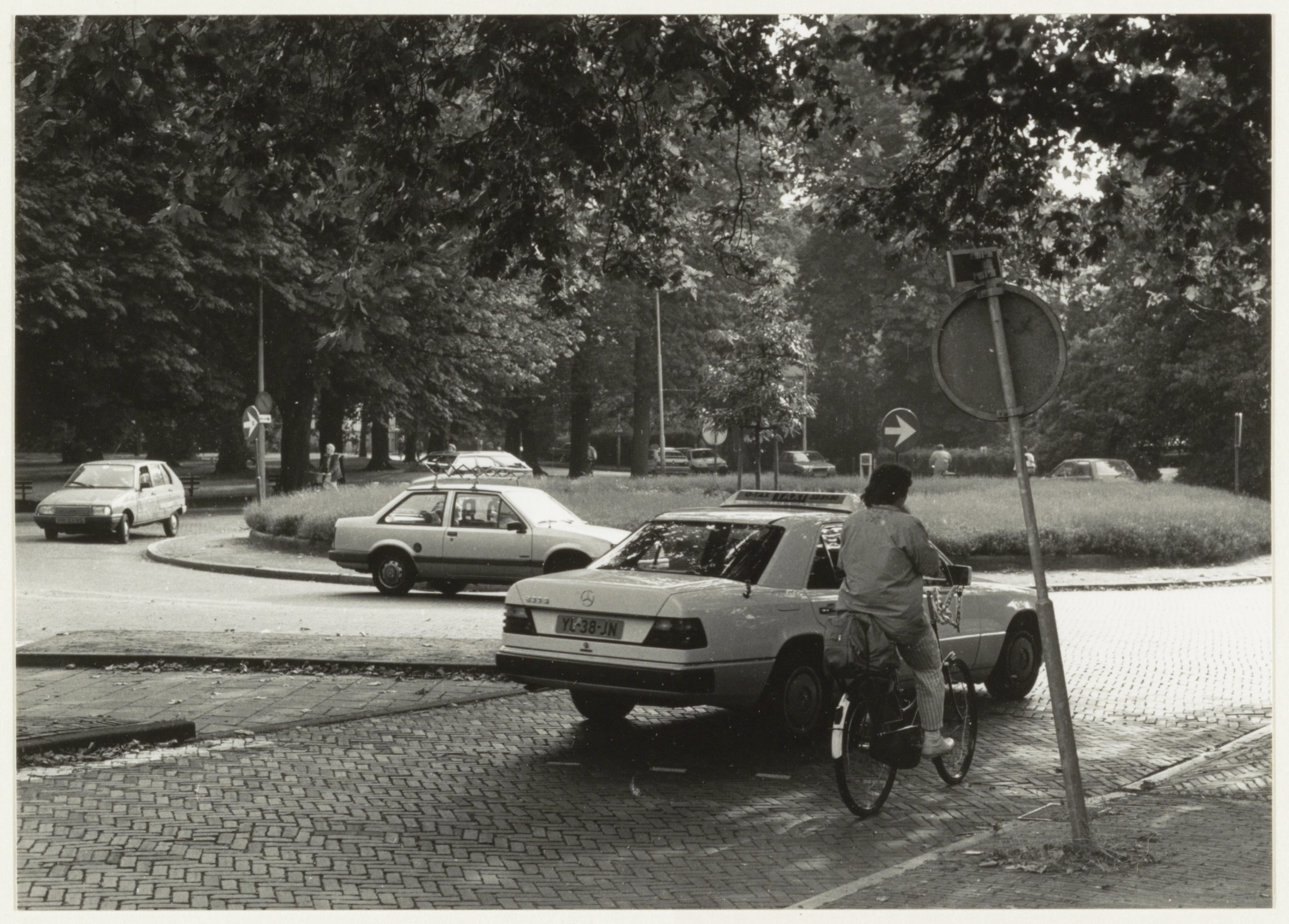 CollectieCollectie Fotoburo de BoerInventarisnummerNL-HlmNHA_54031924NL-HlmNHA_1478_32989KBeschrijvingRotonde Kenaupark.FotonummerNL-HlmNHA_1478_0843DocumenttypeTopografische prenten, tekeningen en foto'sVervaardigerBoer, Poppe de Soort vervaardigerFotograaf AnnotatiesHD150990LandNederland ProvincieNoord-Holland GemeenteHaarlem PlaatsHaarlem StraatKenaupark GeografischStationsbuurt Begindatum1990Einddatum1990TechniekFoto Trefwoordenverkeer, straatgezichten